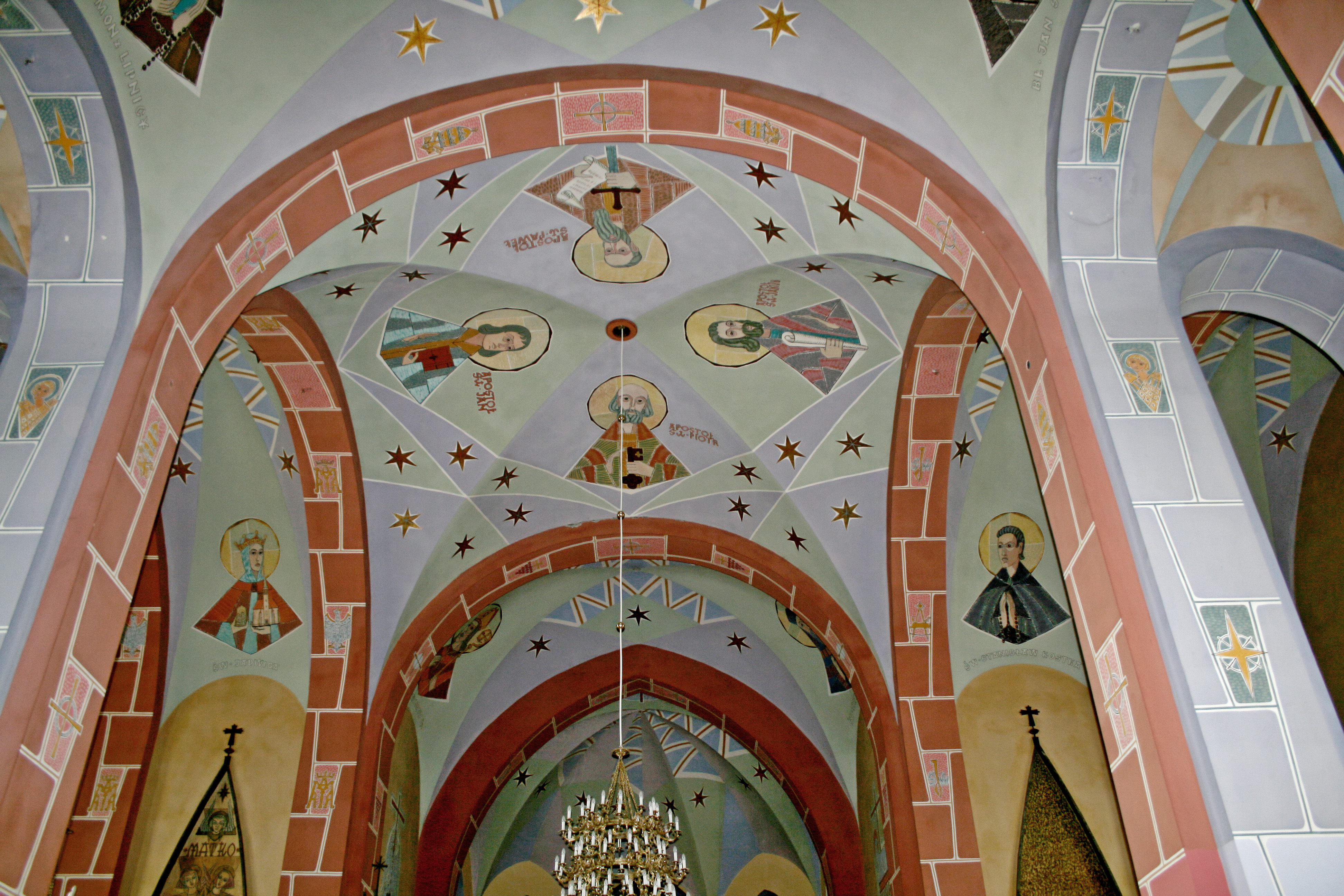 Polichromia w kościele pw. św. Zygmunta w Pniowie. Projektował i wykonał prof. Jan Budziło